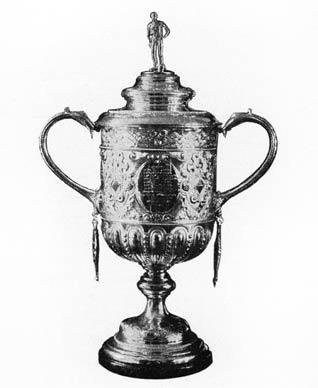 the first FA Cup trophy Primo trofeo per la vincitrice della FA Cup, venne fuso in occasione della prima edizione (1871-1872) e venne rubato in una vetrina di un negozio a Birmingham l'11 settembre 1895 mentre era detenuto dall'Aston Villa.